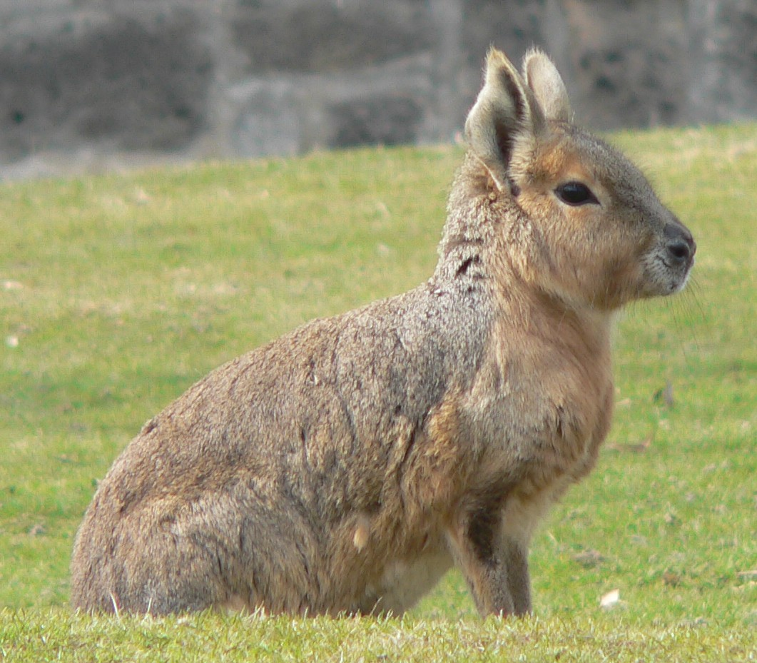 Großer Mara / Großer Papashase